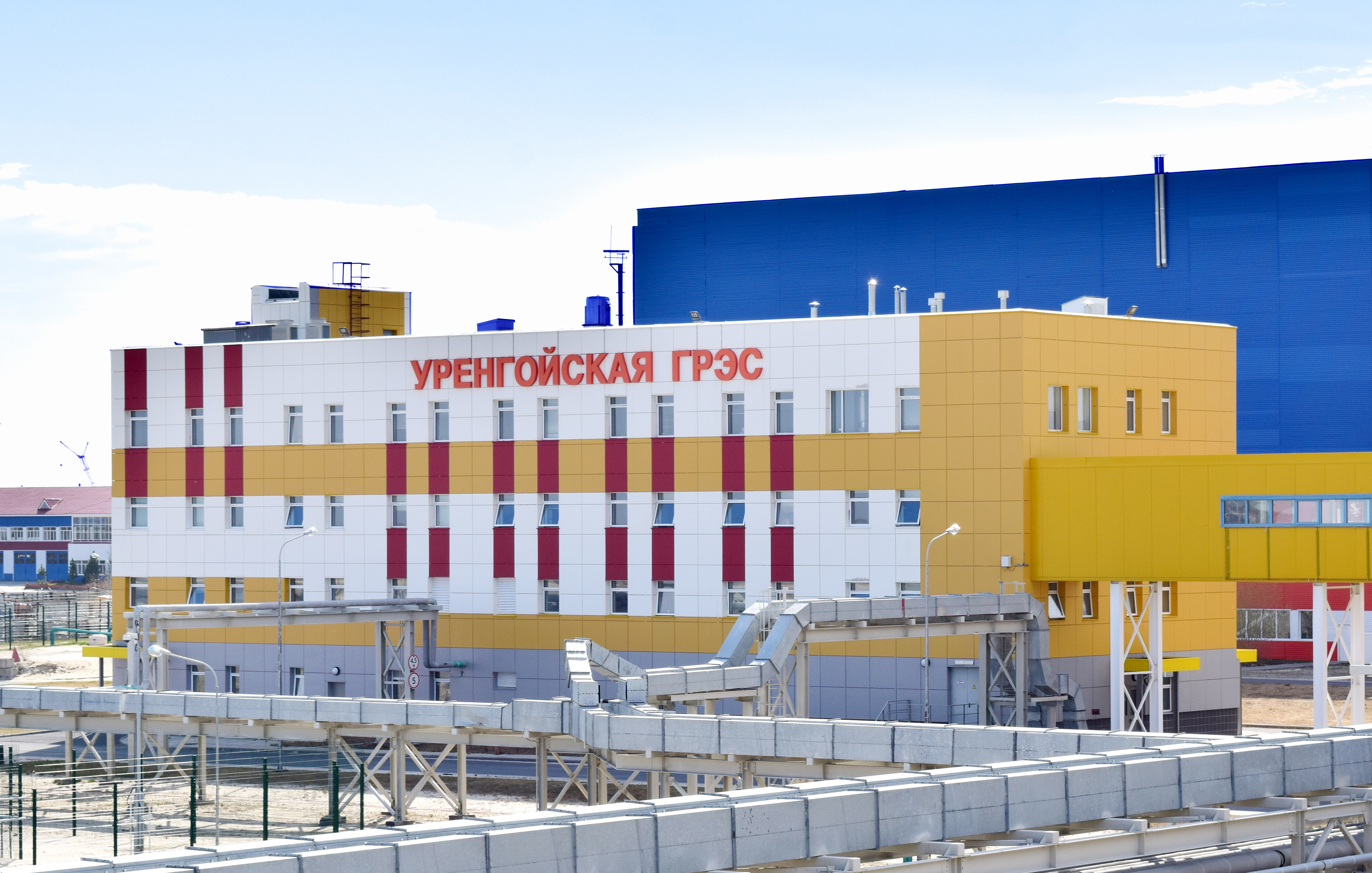 Инженерно-бытовой корпус и ПРТЭЦ